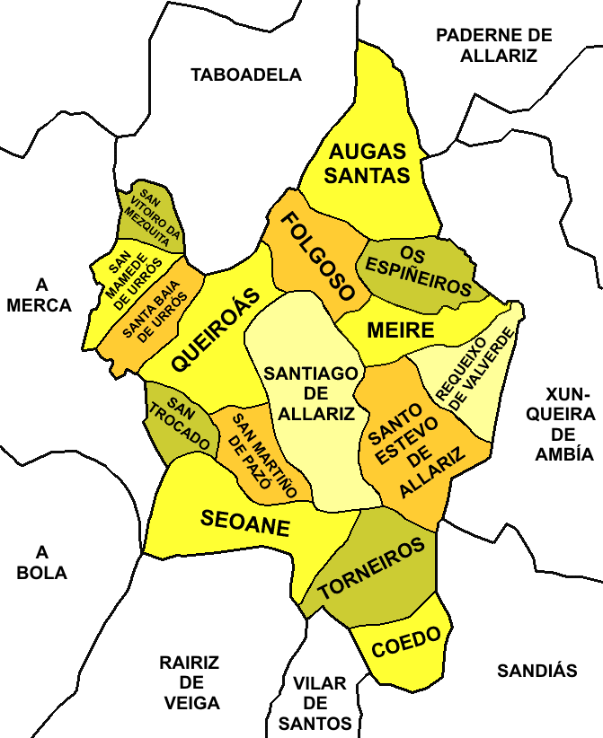 Parroquias do concello de Allariz (Provincia de Ourense)